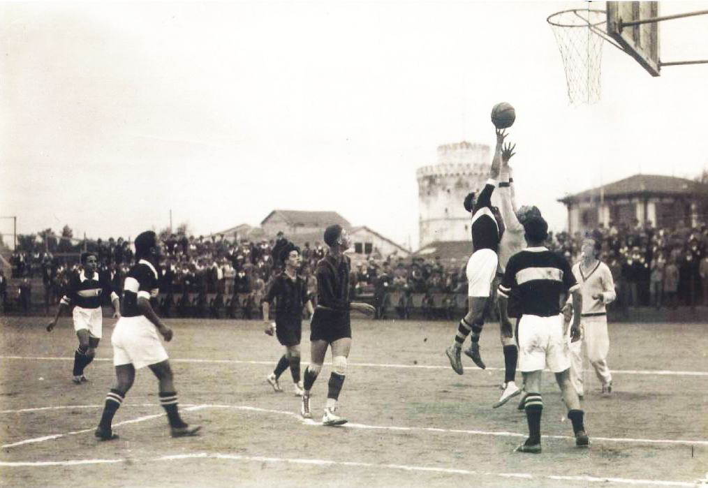 Αγώνας μπάσκετ στη Θεσσαλονίκη, στα τέλη της δεκαετίας του 1920 μεταξύ του ΠΑΟΚ και της ΧΑΝΘ. Η φωτογραφία περιλαμβάνεται και στο λεύκωμα του Δήμου Θεσσαλονίκης